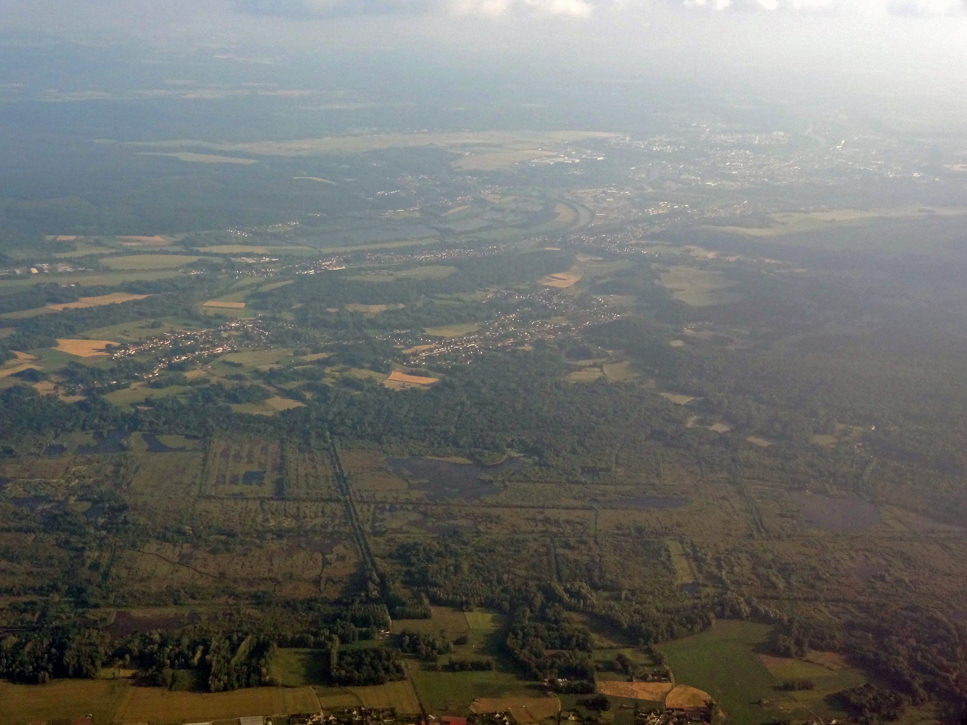 Vue aérienne du marais de Sacy-le-Grand (Oise), France.